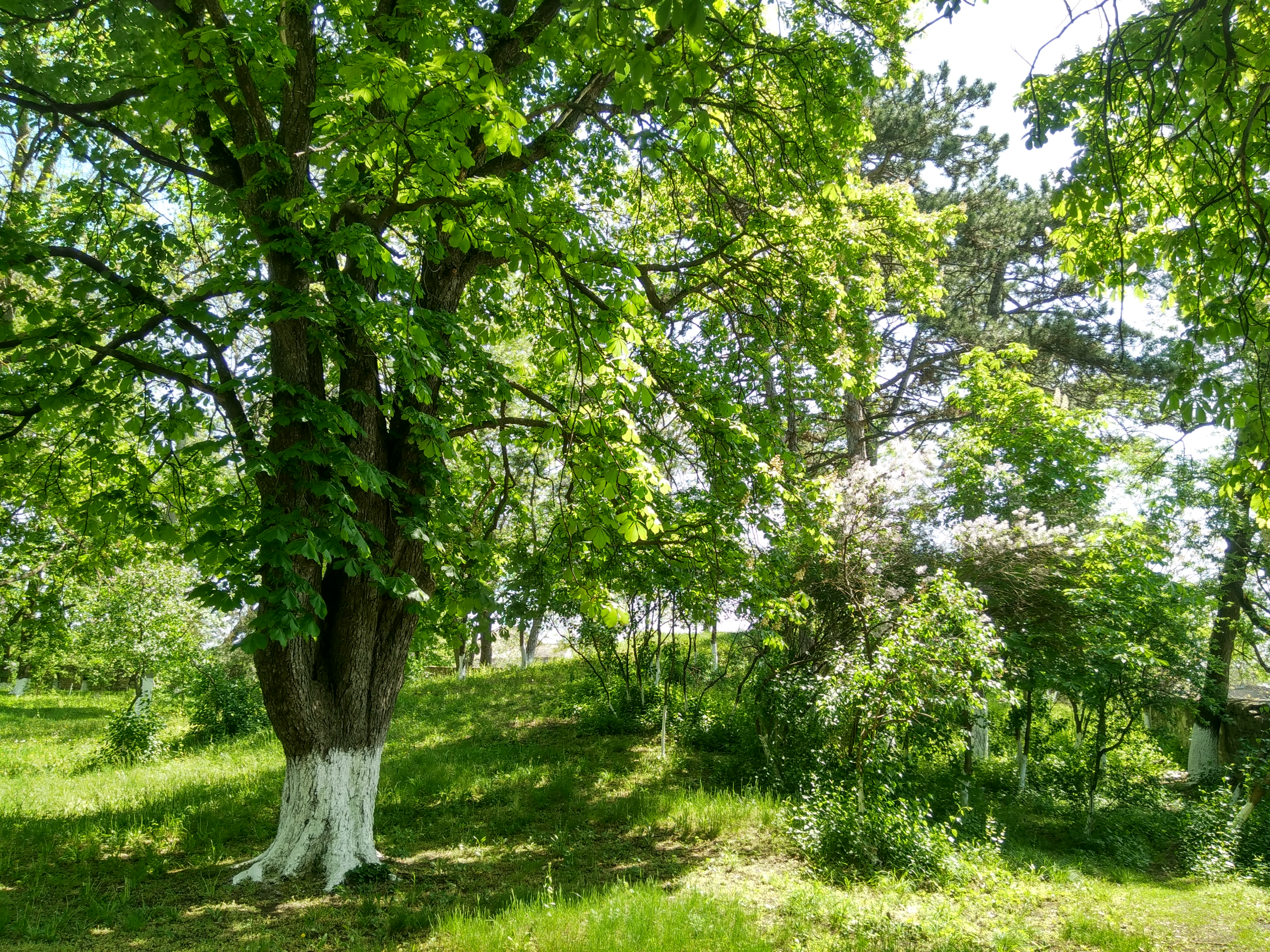 Parcul din satul Brînzeni, monument al naturii amplasat în raionul Edineț, satul Brînzeni (cod MD-ED-map-013)